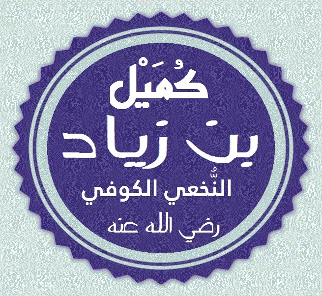 تخطيط اسم كميل بن زياد النخعي